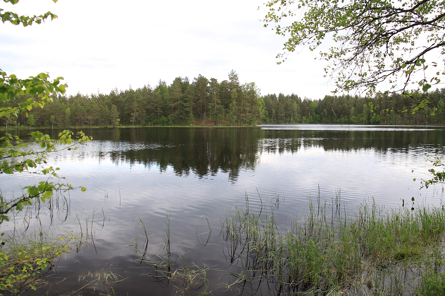 Jussi Linajärv Põhja-Kõrvemaal